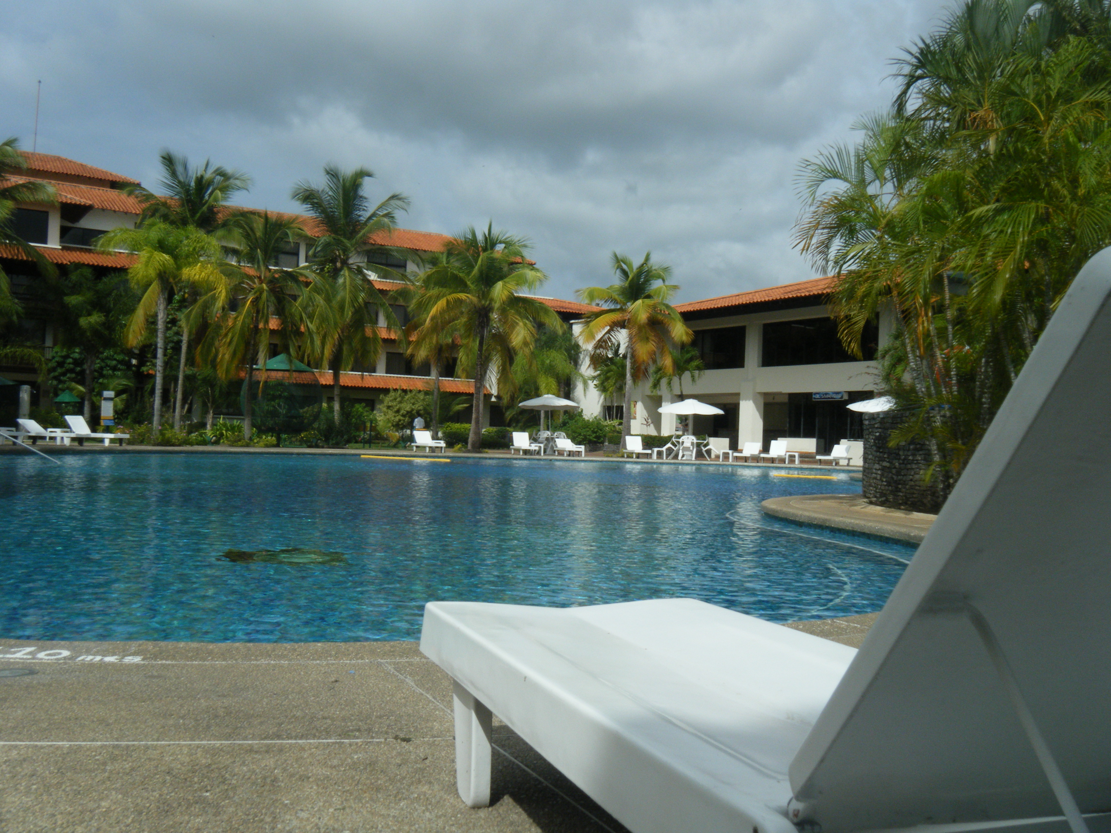 Piscina del Hotel Stauffer Maturin, Monagas